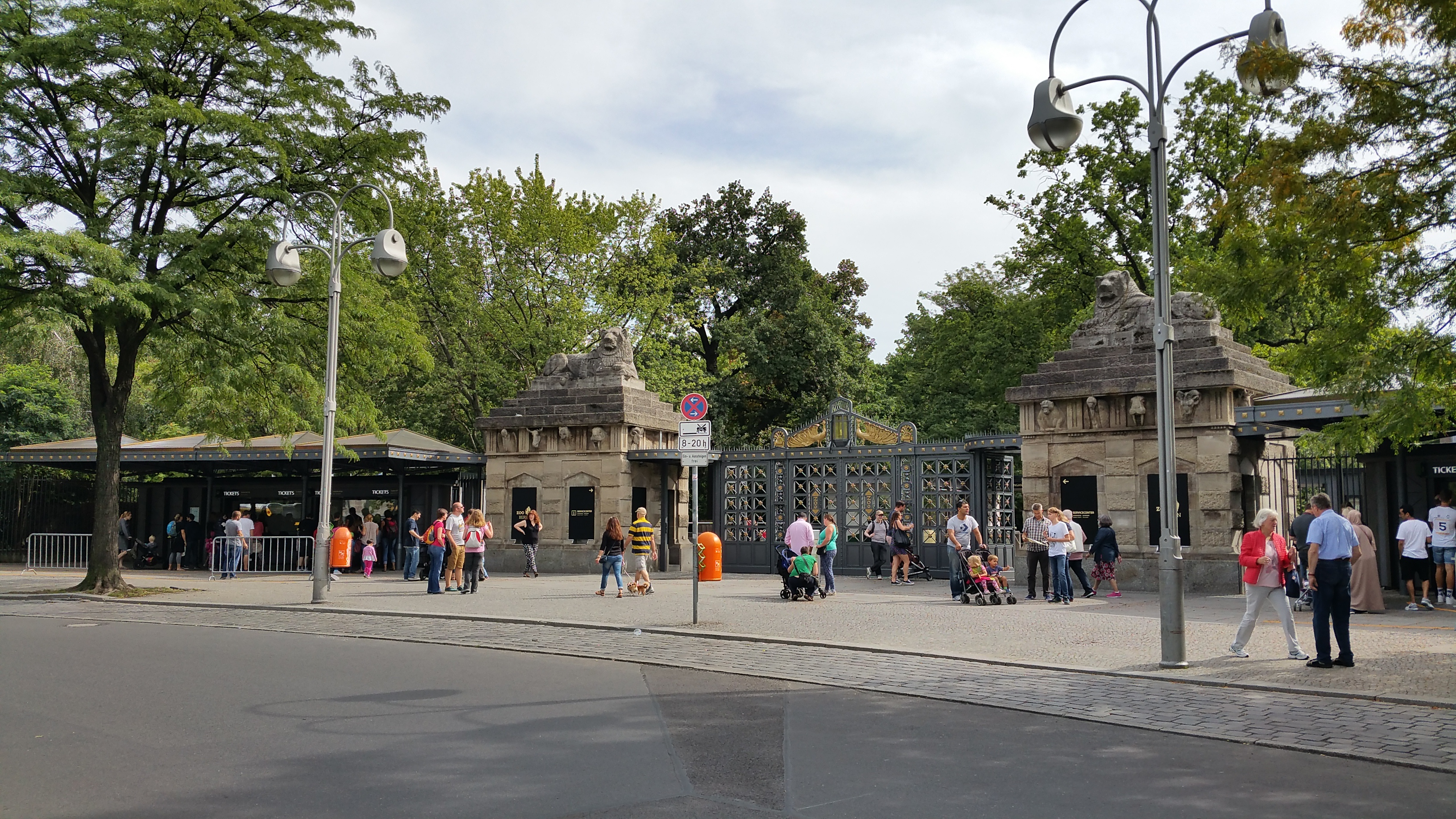 Das 2016 neugestaltete Löwentor des Zoologischer Garten Berlin am Hardenbergplatz